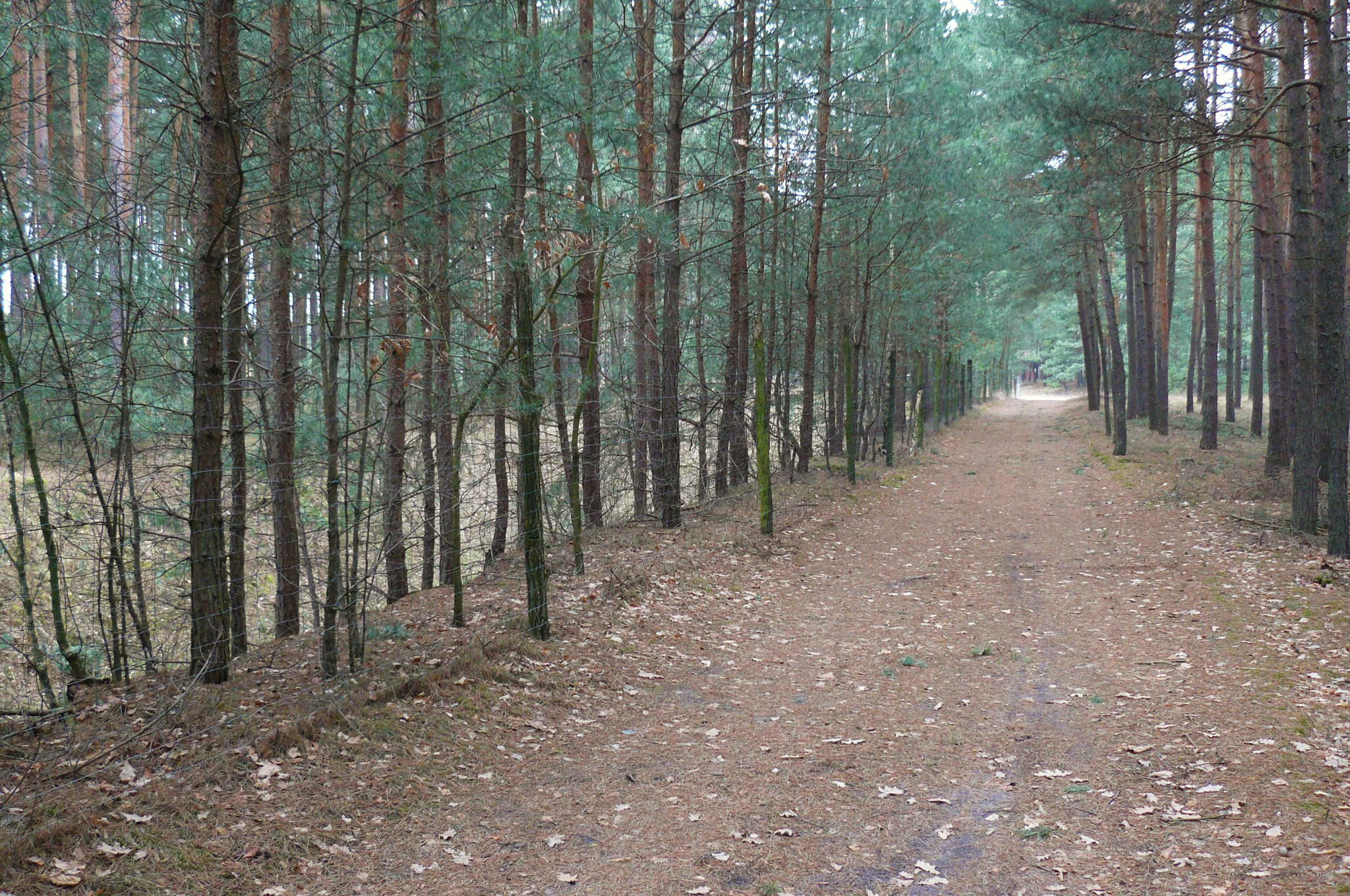 Tzw. Rów Syzyfa w Mężyku - Puszcza Notecka. Wykopany ręcznie przez Pawła Jechalika. Ukończony w 1999.